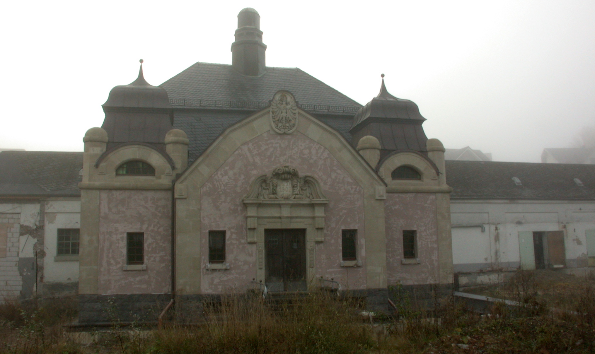 Brunnentempel des Mineralbrunnens Niederselters, Deutschland